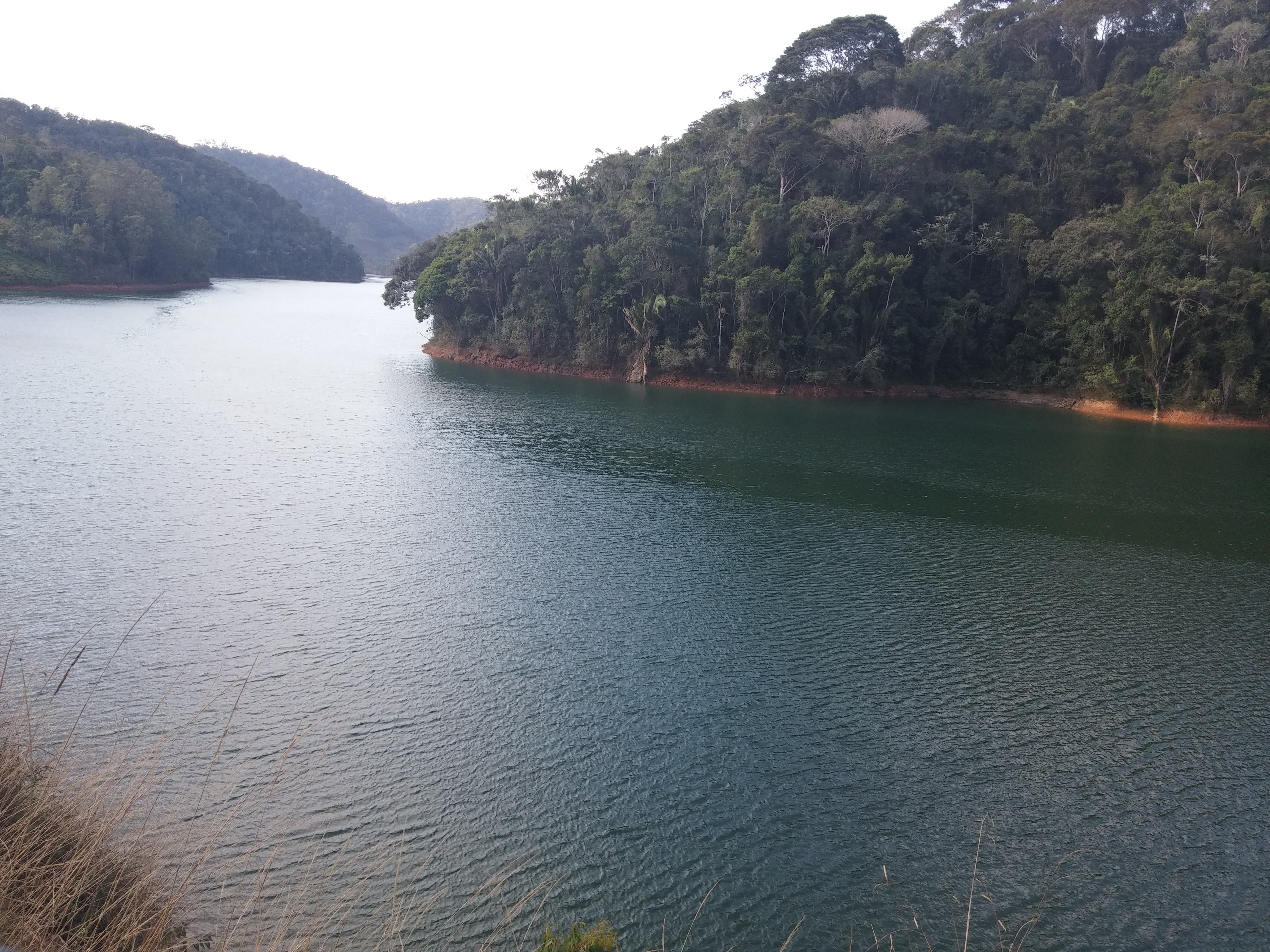 Represa de Santa Maria de Jetibá